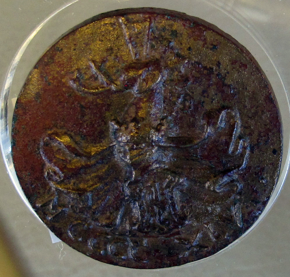 Matteo de' pasti, medaglia di s.p. malatesta e il cimiero, no firma, verso 01 da castel sismondo